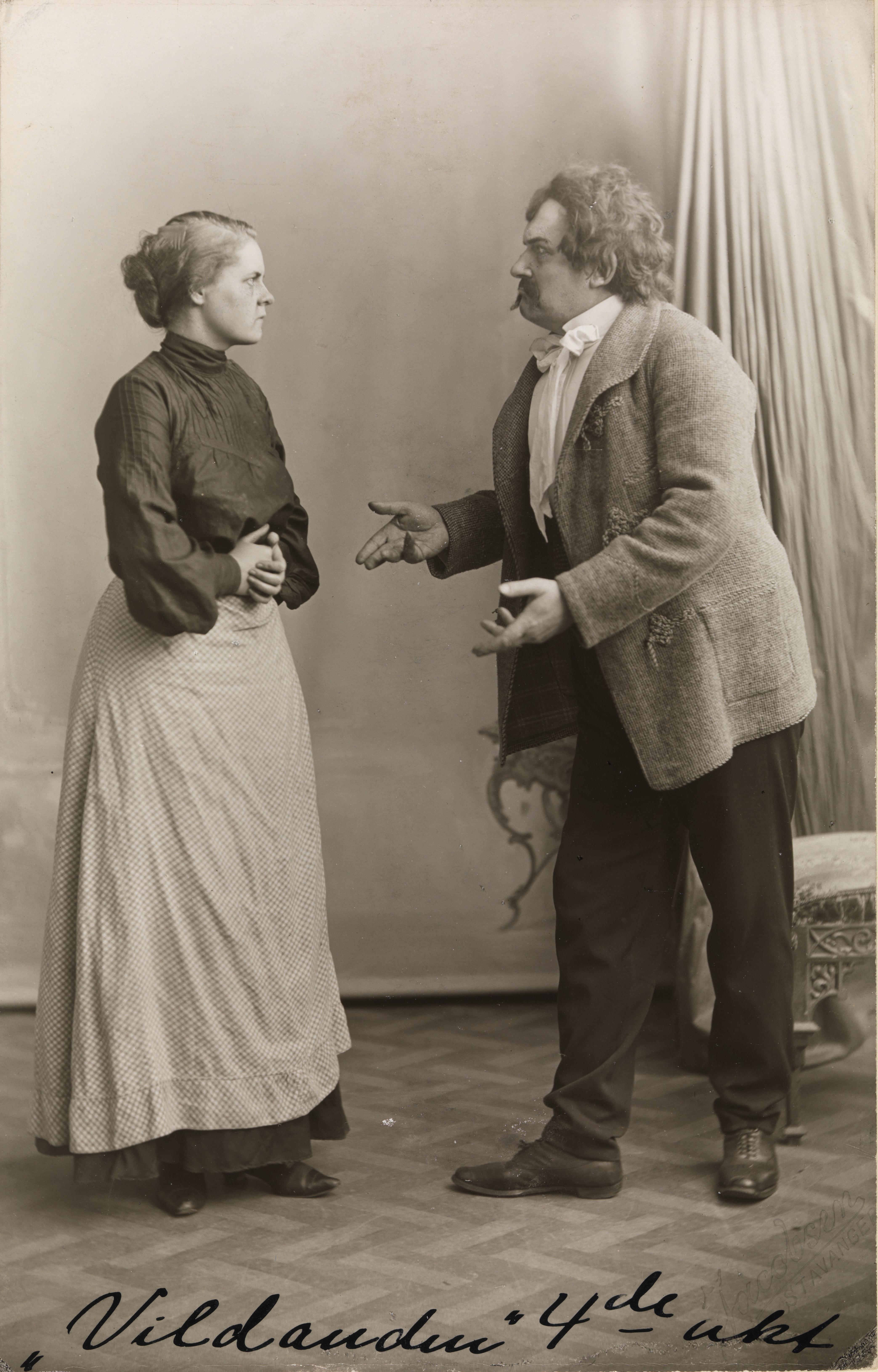 Bildet er hentet fra Nasjonalbibliotekets bildesamling. Anmerkninger til bildet var: Tittel hentet fra tekst på forsiden av fotografiet Depicted person: Hamsun, Marie Depicted person: Lavik, Dore